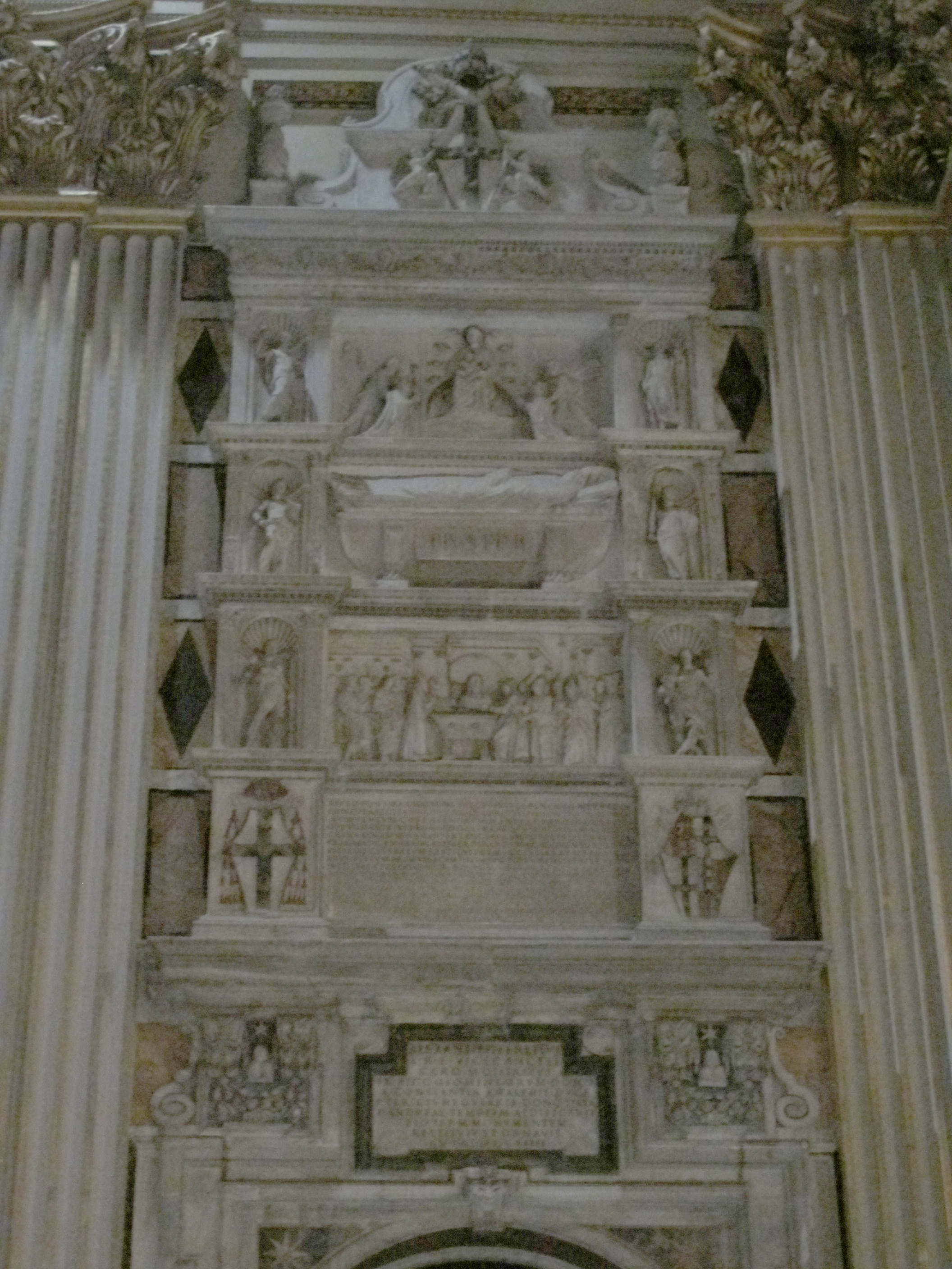 Sant'andrea della valle, paolo tacconi, monumento di pio II, 1470, da s.pietro